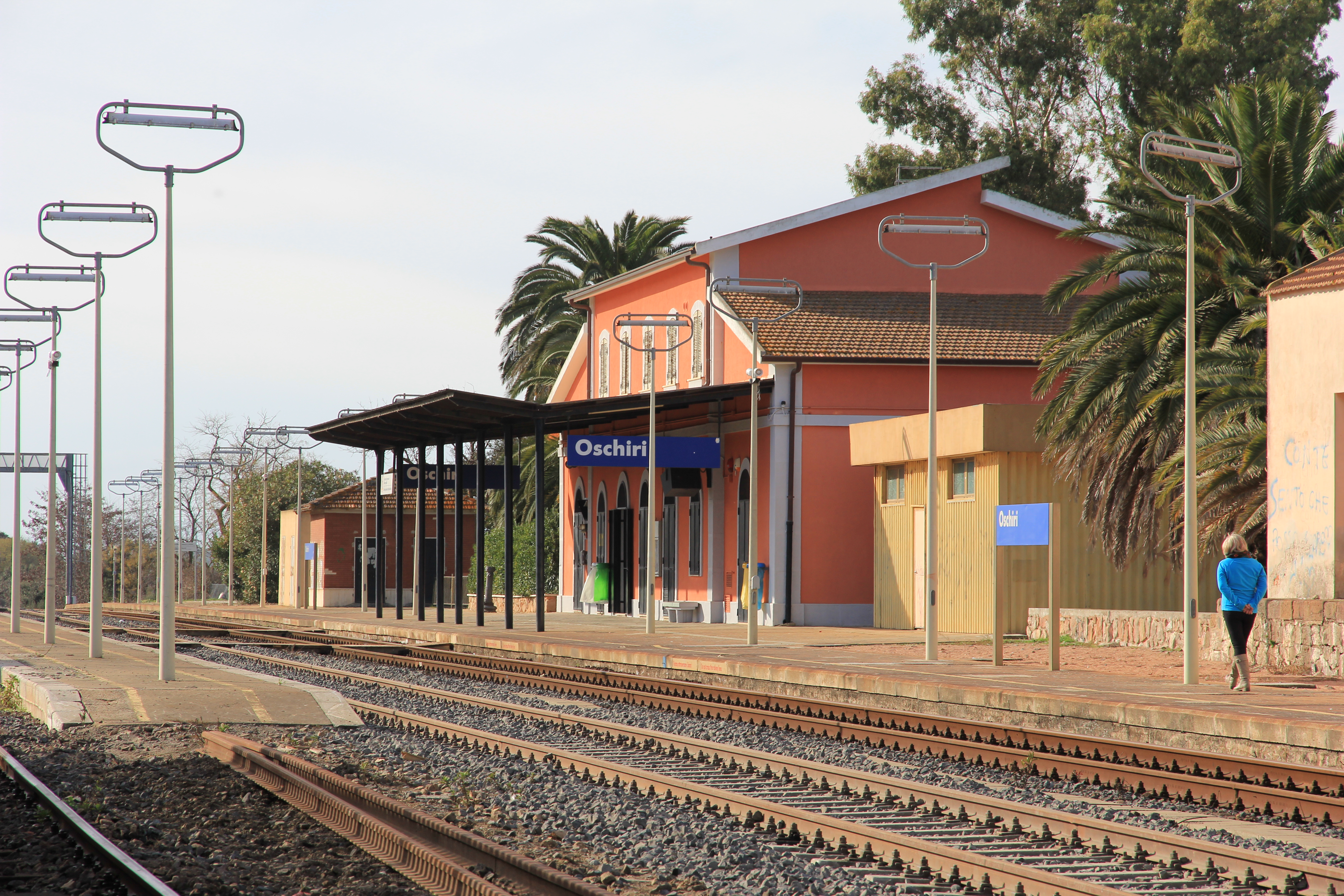 Oschiri - Stazione ferroviaria